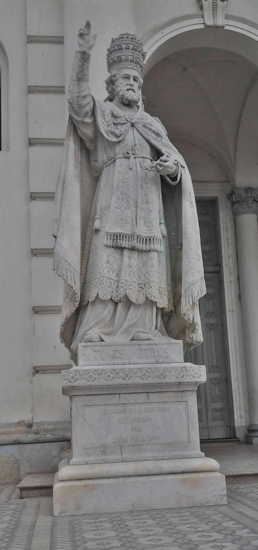 Estatua a San Pedro en la Catedral Metropolitana de Paraná, Entre Ríos, Argentina.